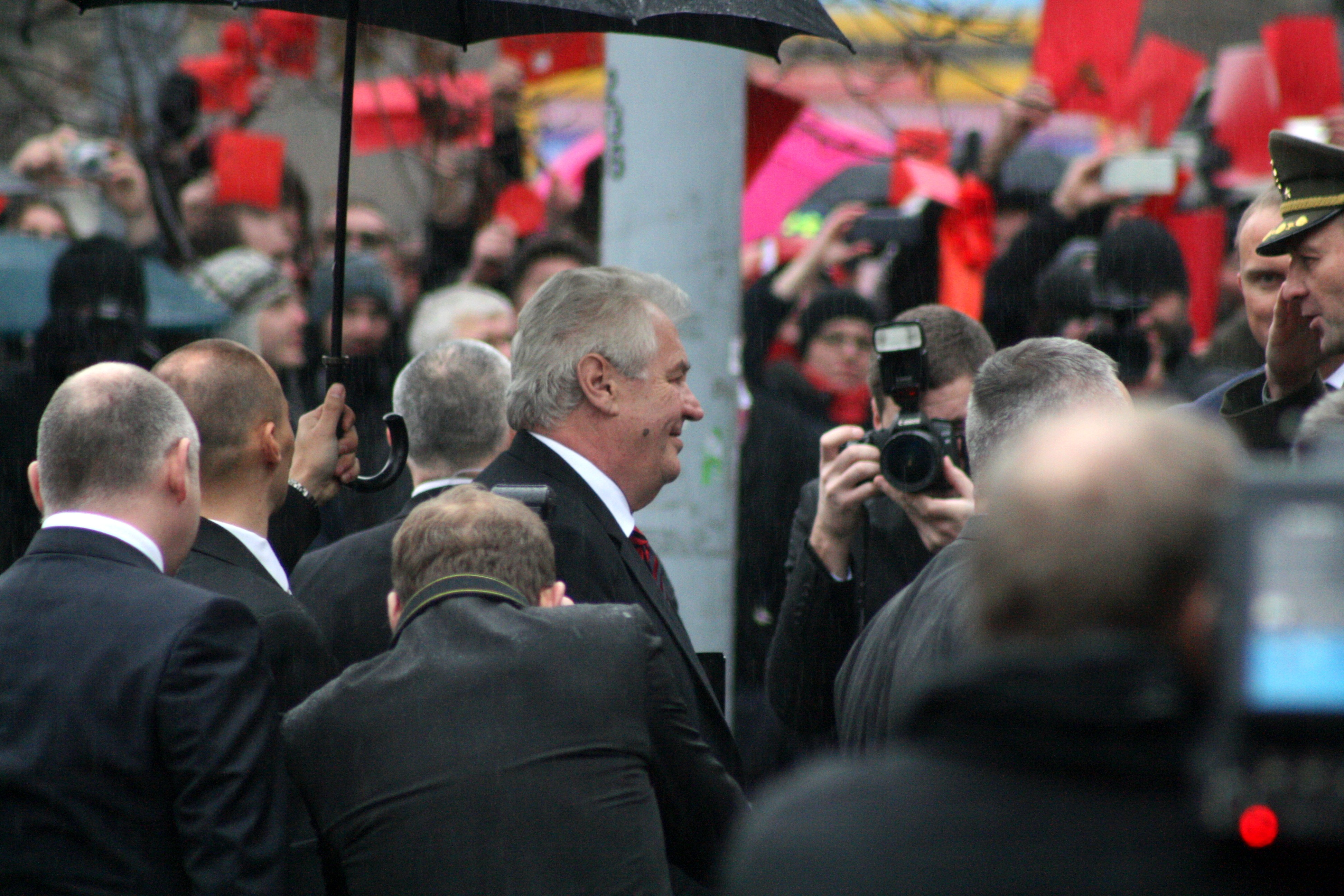 Protestní událost "Přivítání Miloše Zemana červenými kartami" během třídenní návštěvy prezidenta Miloše Zemana v městech jižní Moravy, uspořádaná v pondělí 1. prosince 2014 od 11:30 před budovou Univerzity obrany na Kounicově 44. Prezidenta před vstupem vítá rektor UO, brigádní generál Bohuslav Přikryl, v pozadí účastníci demonstrace.